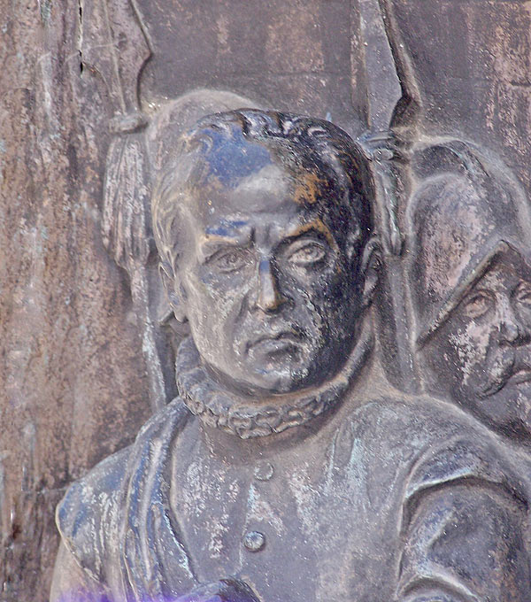 Lope de Figueroa, interpretación de Juan Figueras y Vila. Detalle del bajorrelieve con una escena de El alcalde de Zalamea en la estatua de Calderón de la Barca de la plaza de santa Ana de Madrid.